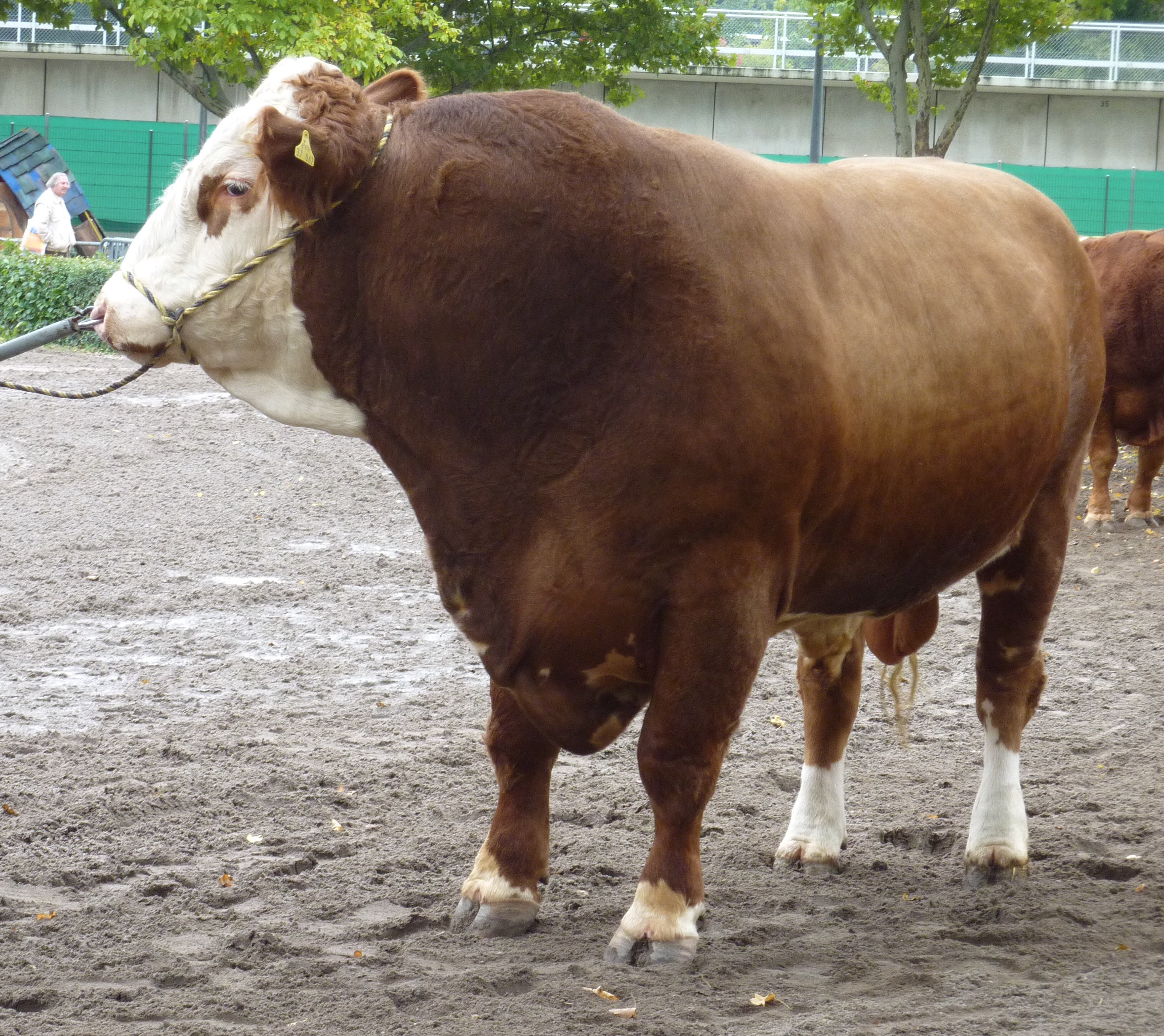 Landwirtschaftliches Hauptfest 2010